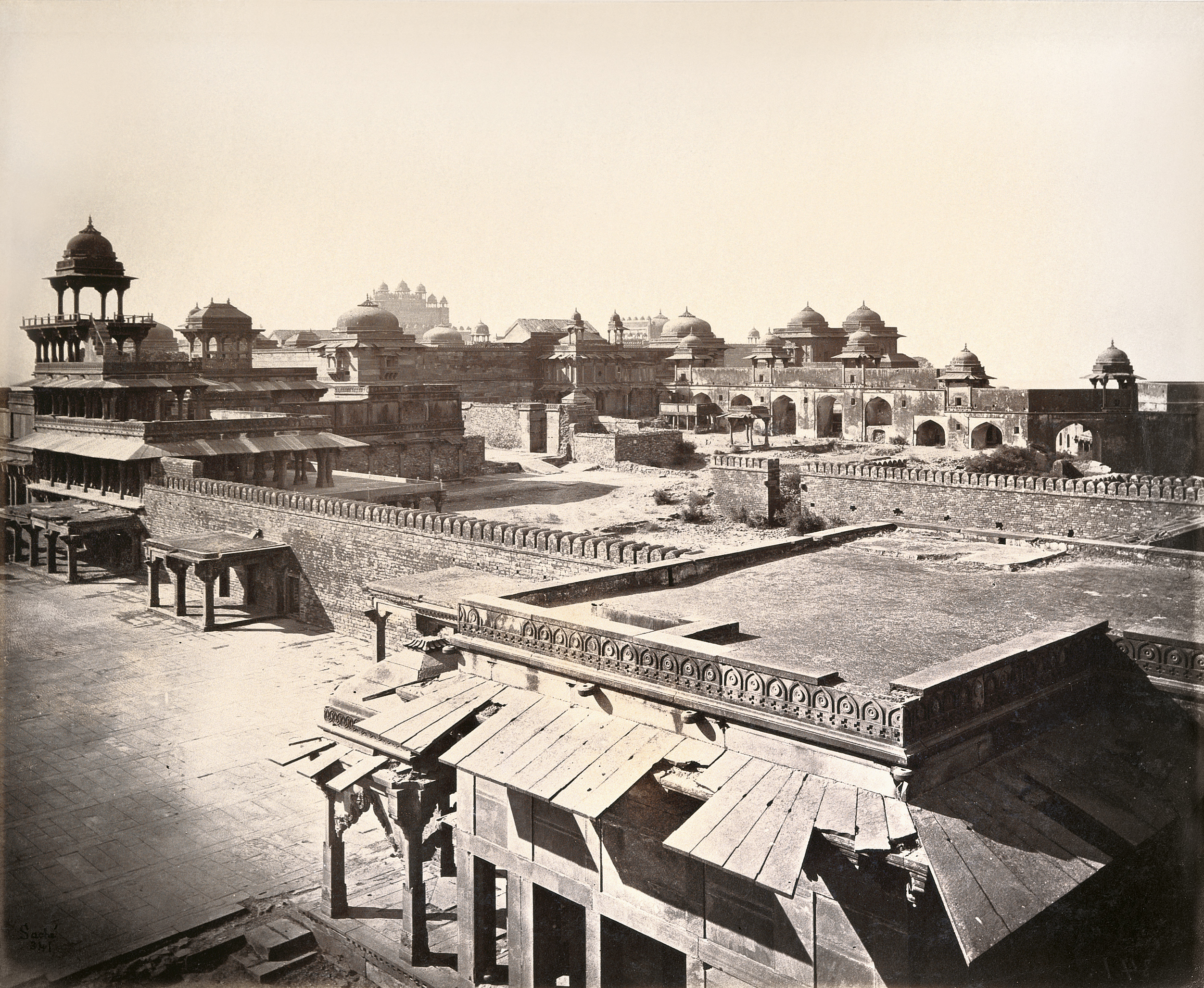 Jama Masjid, Agra